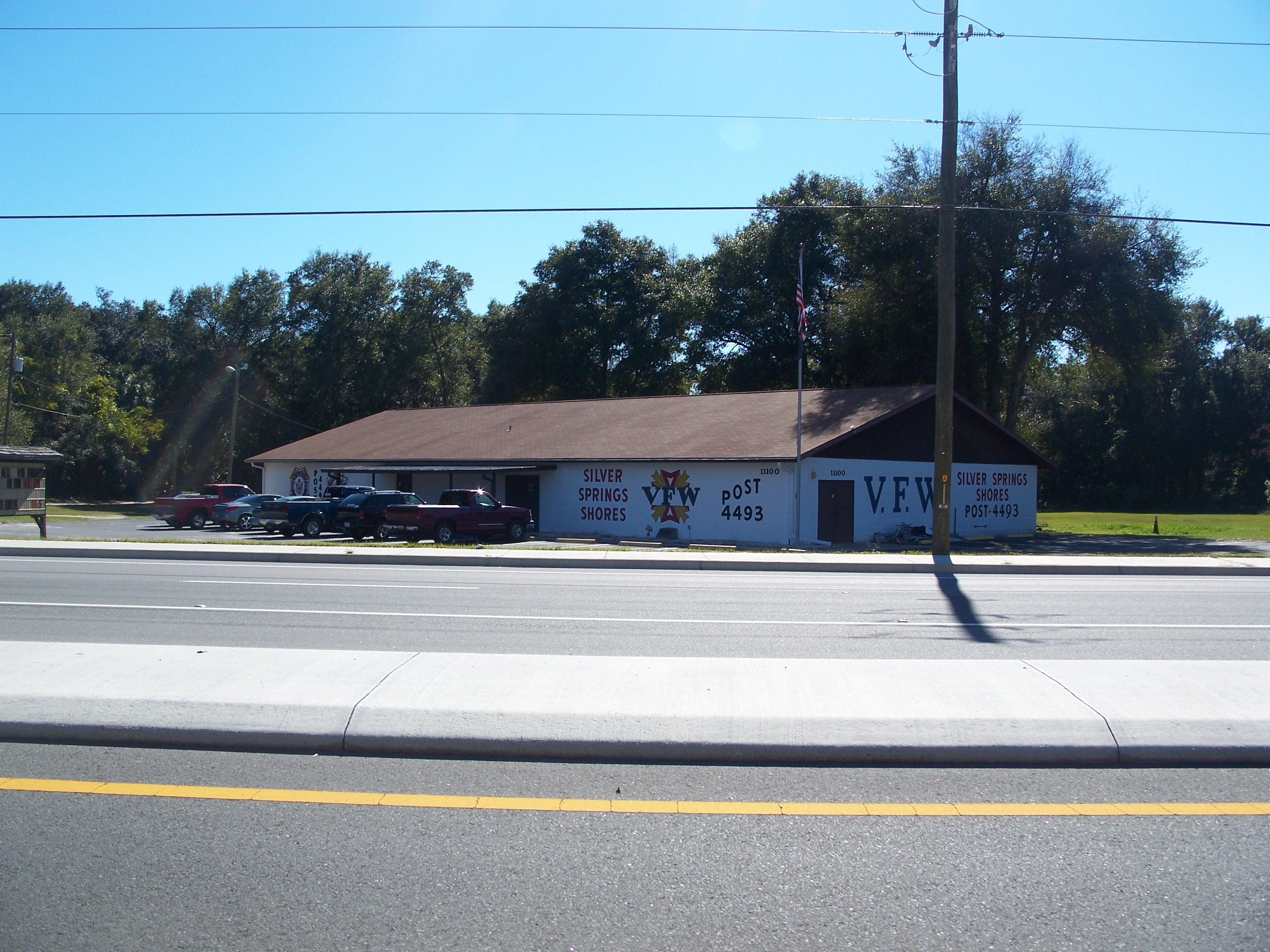 Candler, Florida: VFW outpost